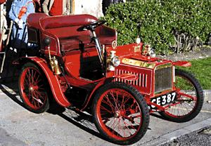 Minerva, gebouwd omstreeks 1900